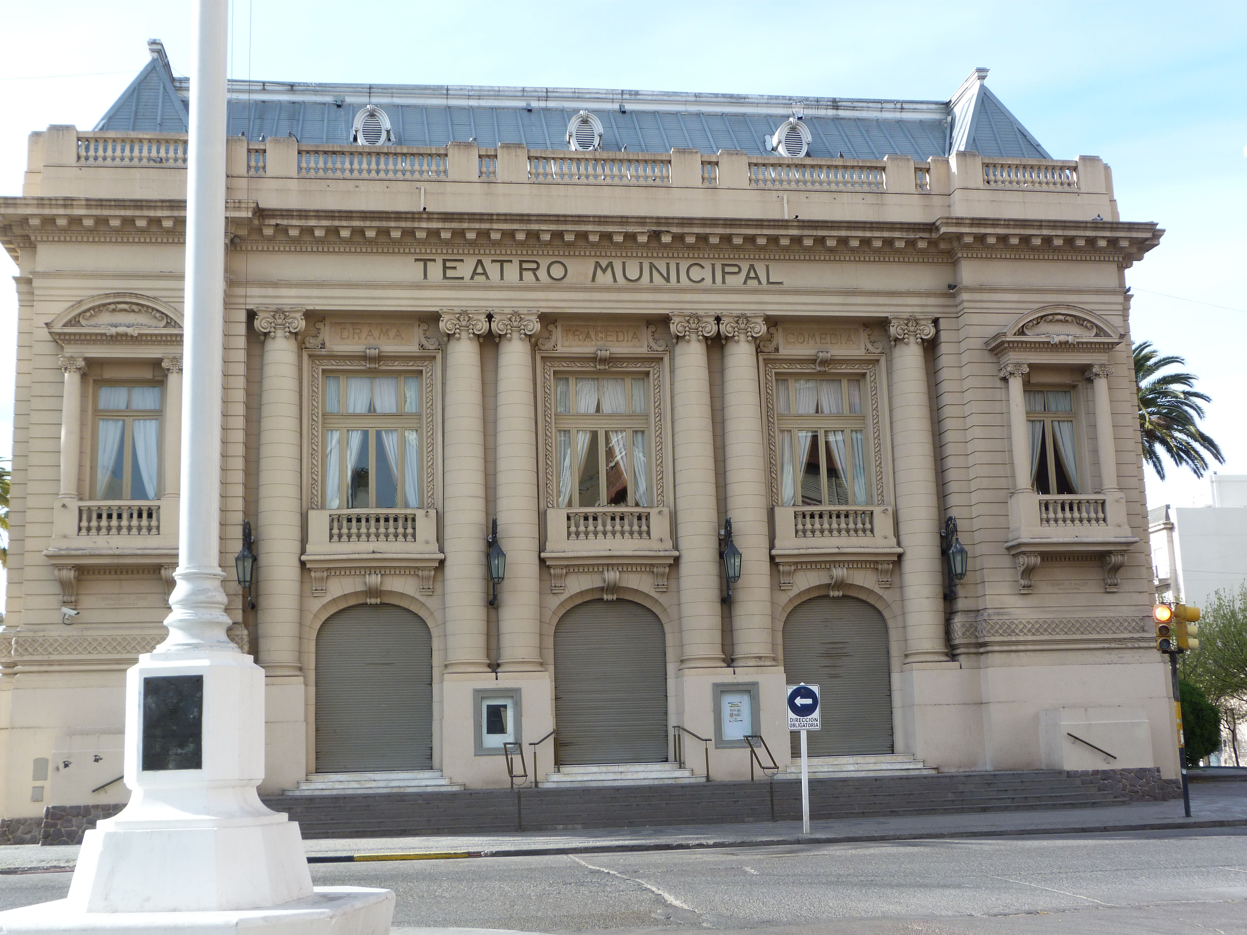 Teatro Municipal de Bahía Blanca